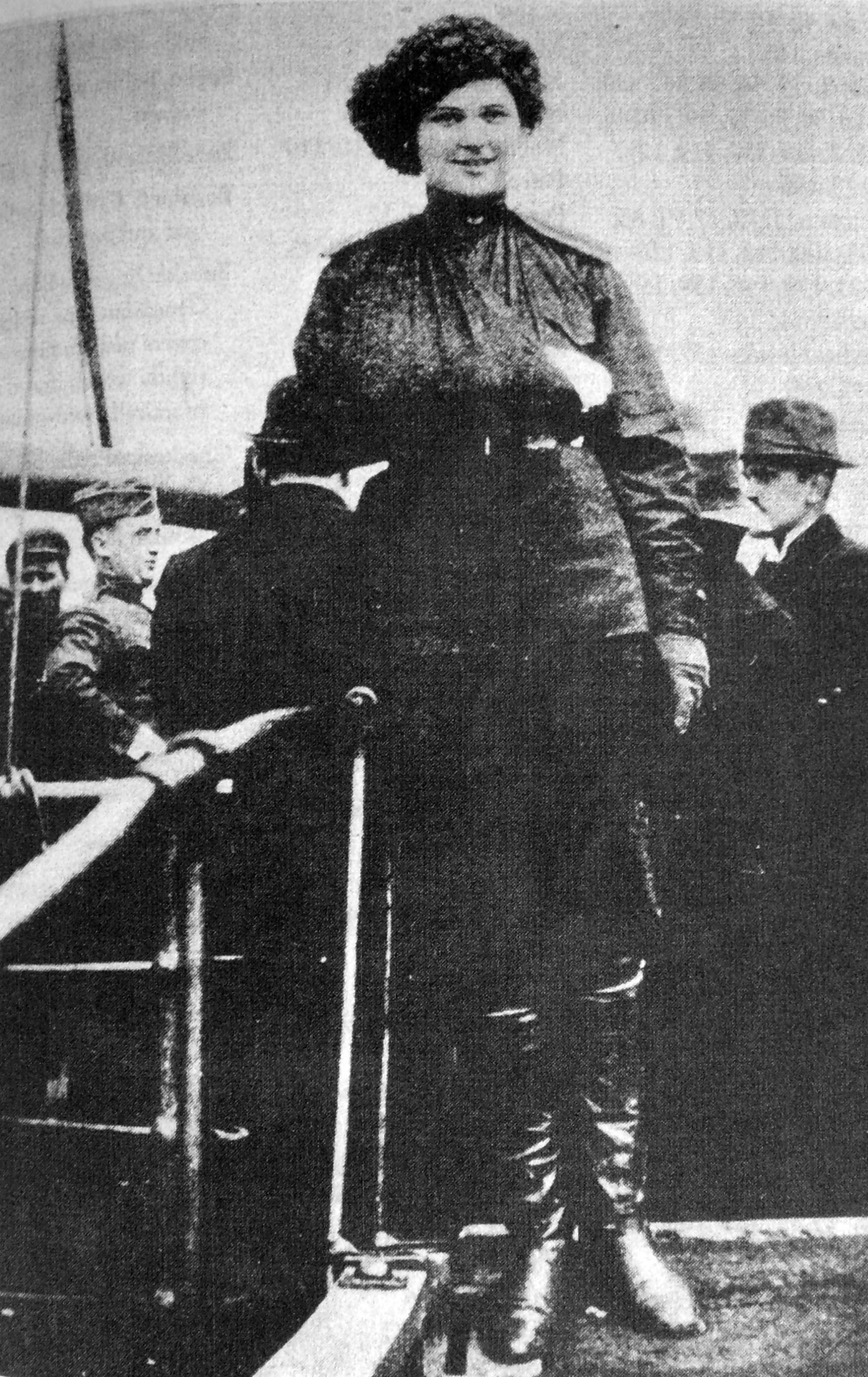 Marina Yurlova à son départ vers le Japon 1919